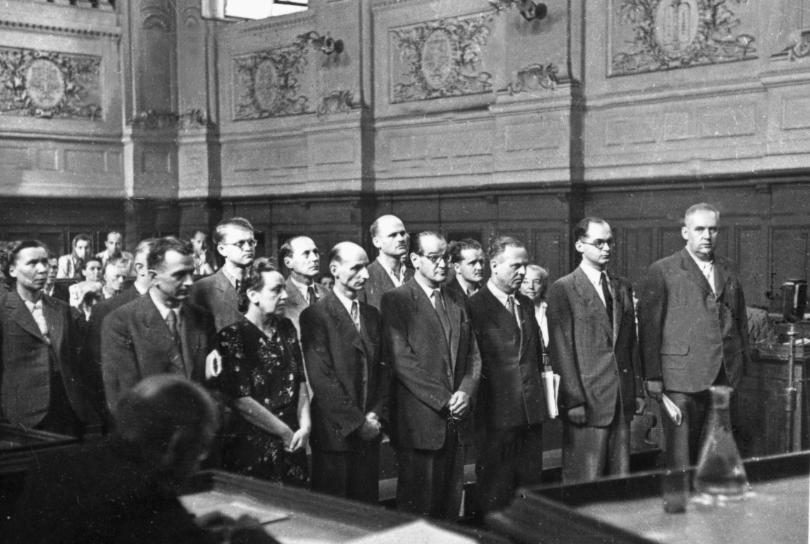 Nagodetov proces – obtoženci med branjem obtožnice. V prvi vrsti z desne proti levi: Črtomir Nagode, Ljubo Sirc, Leon Kavčnik, Boris Furlan, Zoran Hribar, Angela Vode, Metod Kumelj; druga vrsta z desne proti levi: Pavla Hočevar, Svatopluk Zupan, Bogdan Stare, Metod Pirc, Vid Lajovic, Franjo Sirc, Elizabeta Hribar.